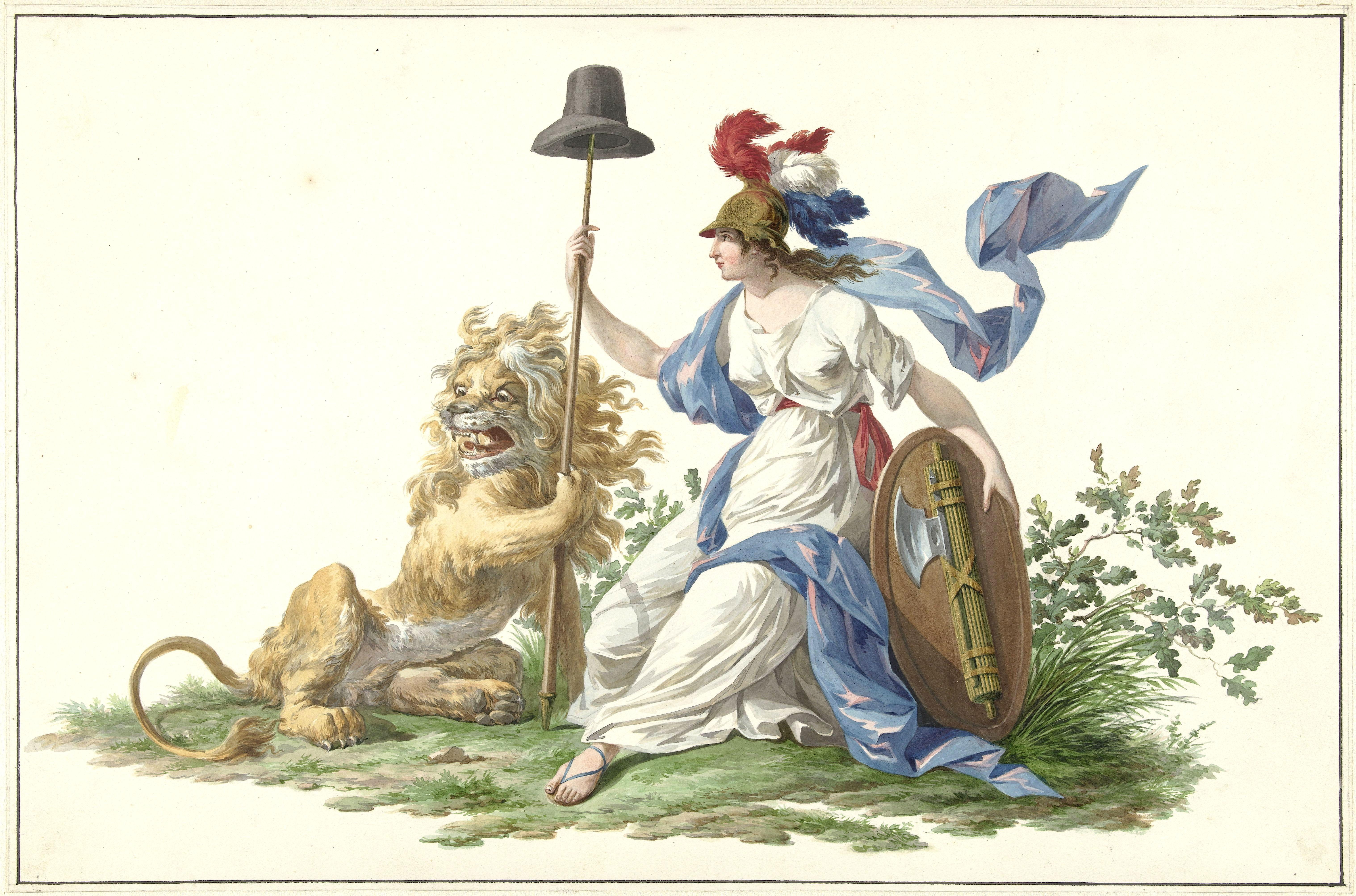 Model voor de vlag van de Bataafse Marine, 1796, Rijksmuseum